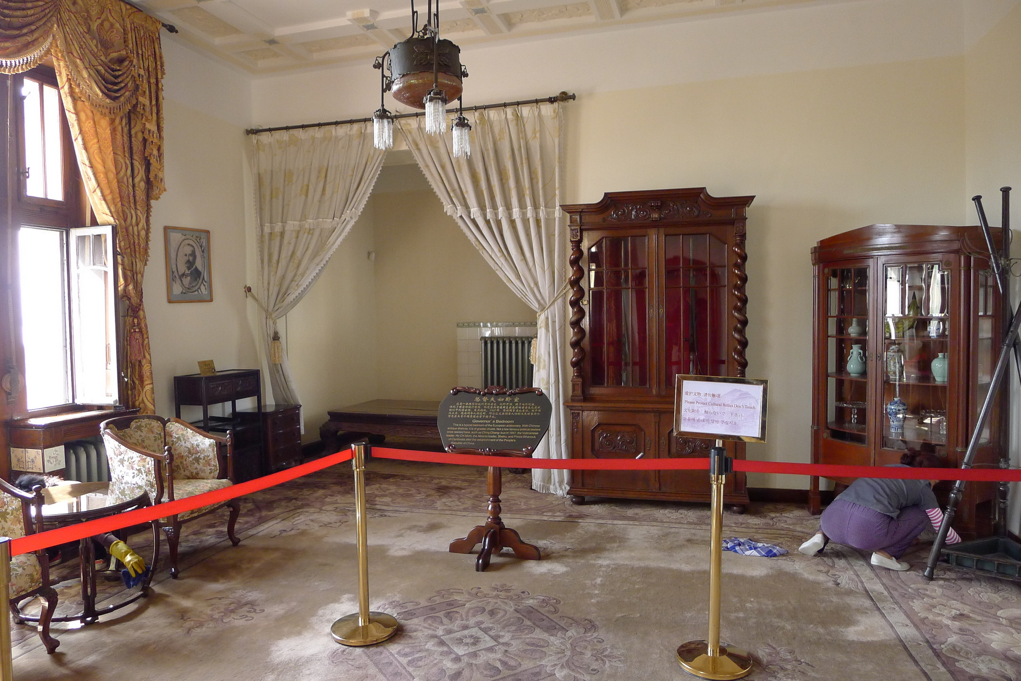 青岛总督府总督夫妇卧室